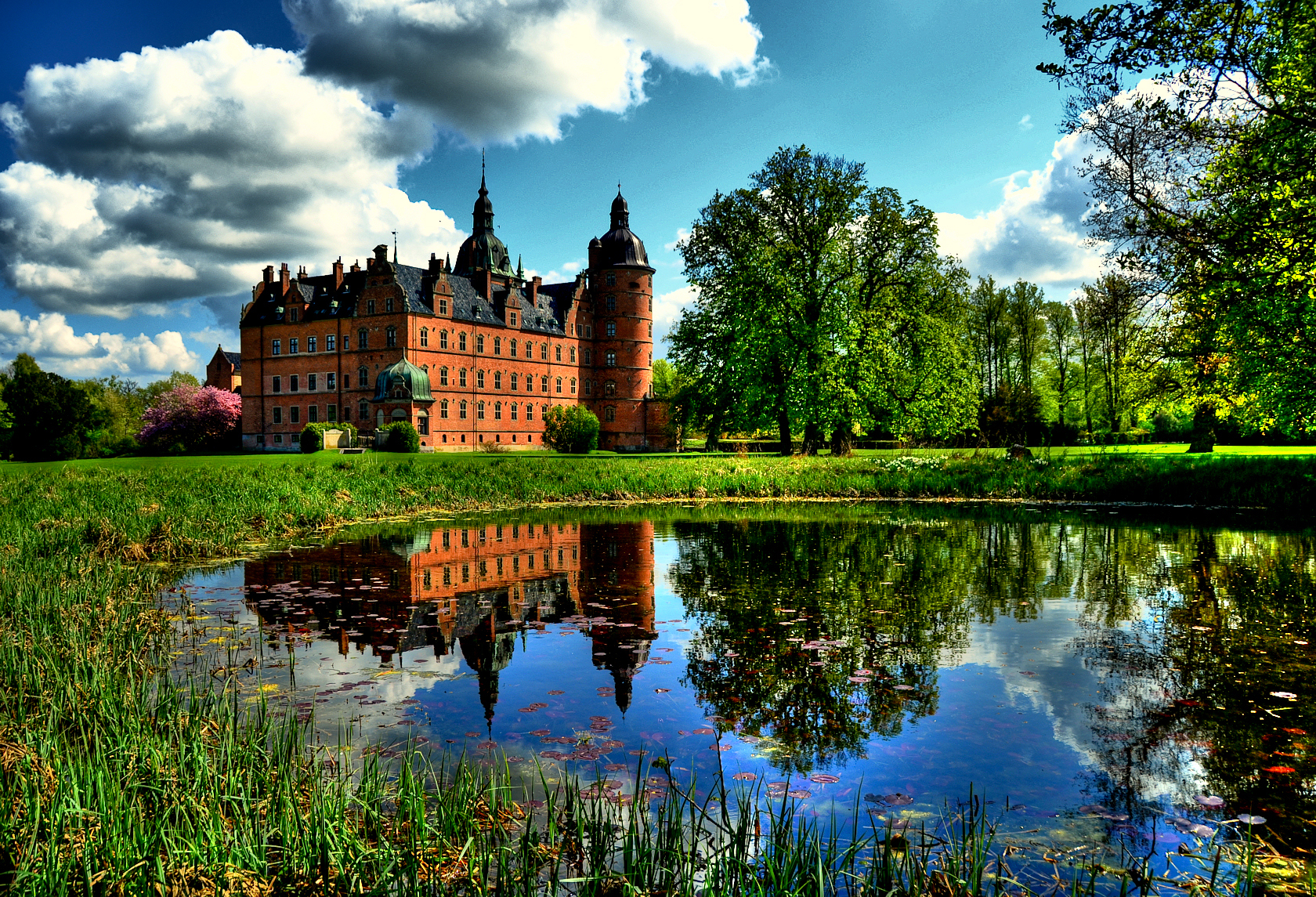 Vallø Castle in Denmark